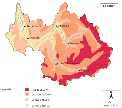 Carte du département de la Savoie en France. Présentation du relief. Cette image est un montage fait à partir d'une image prise sur commons (libre de droit) à l'adresse suivante . L'image a été recadrée afin de ne conserver que le département de la Savoie. Le fond a été blanchi et transformée en format jpg.